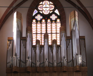 St.-Gallus-Kirche in Ladenburg